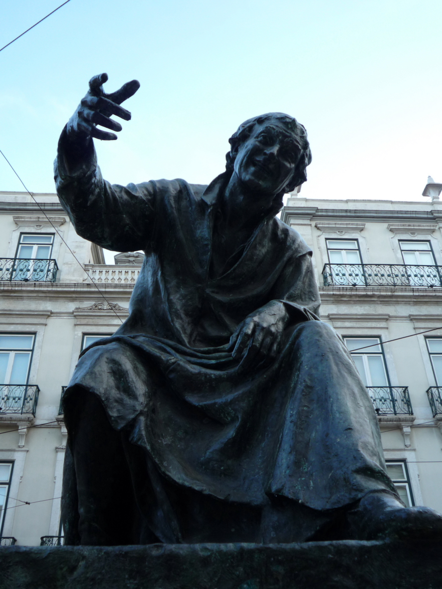 Statua del poeta António Ribeiro, "O Chiado", in Largo do Chiado.